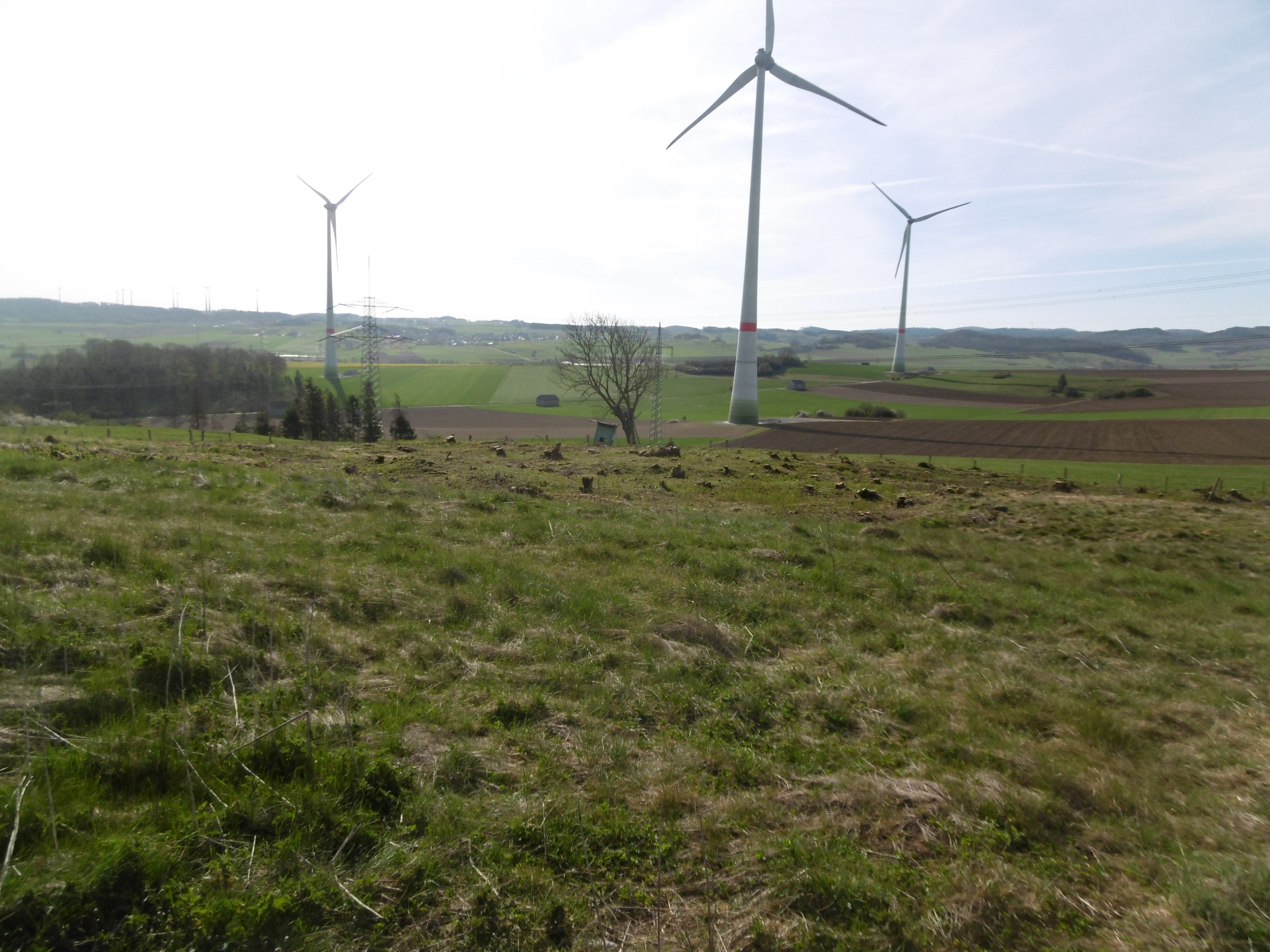 Bereich mit Magerrasen und Magergrünland im Naturschutzgebiet Halle vorne, dahinter Landschaftsschutzgebiet Offenlandkomplex um Wülfte / Briloner Hochfläche​. Gehölze wurden Anfang 2020 entfernt.​